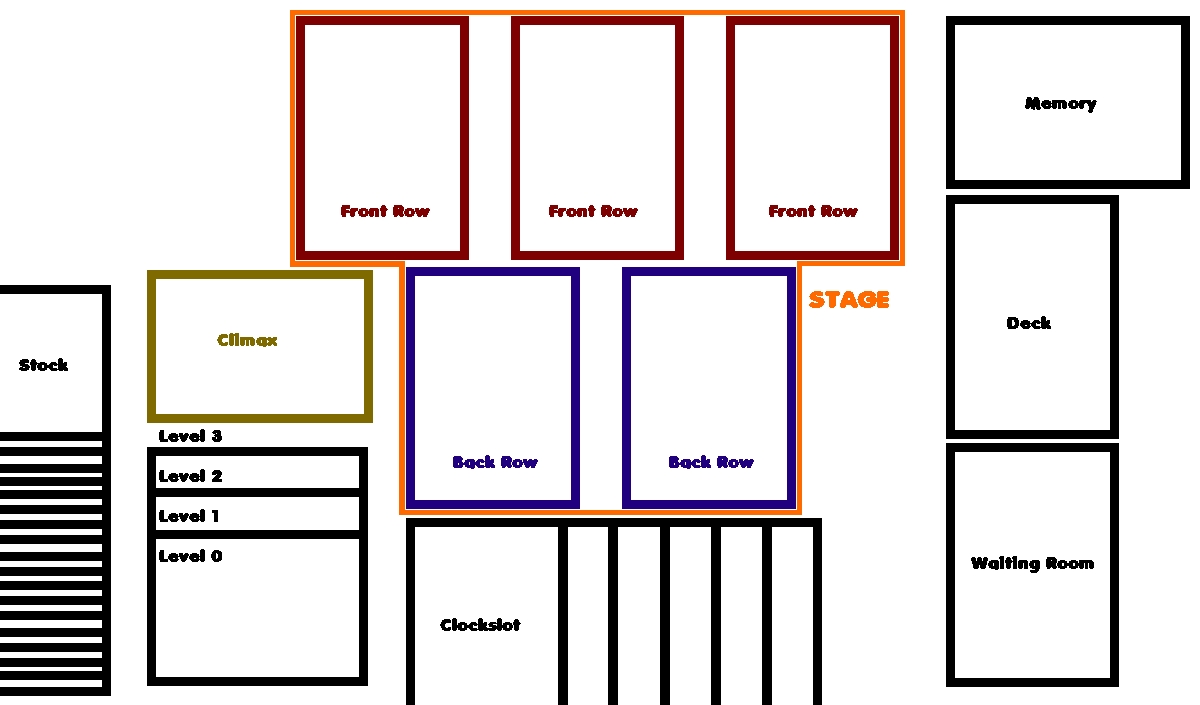 Spielfeldaufbau WS